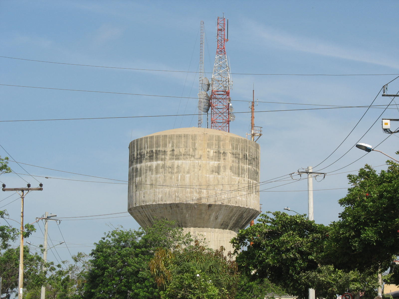 Torres de Comunicaciones en el Tanque de las Delicias